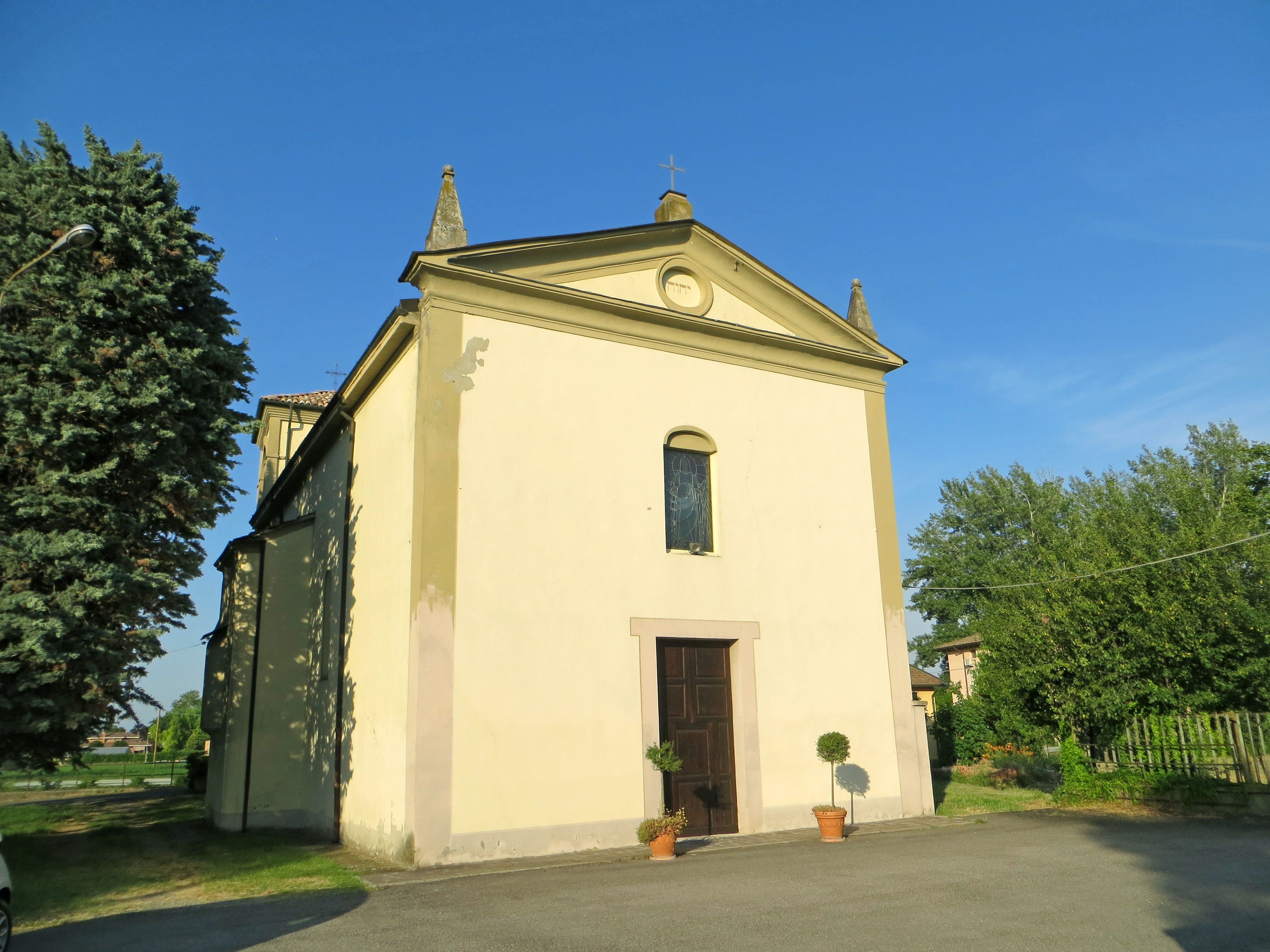 Chiesa di San Bartolomeo (Mariano, Parma) - facciata e lato nord